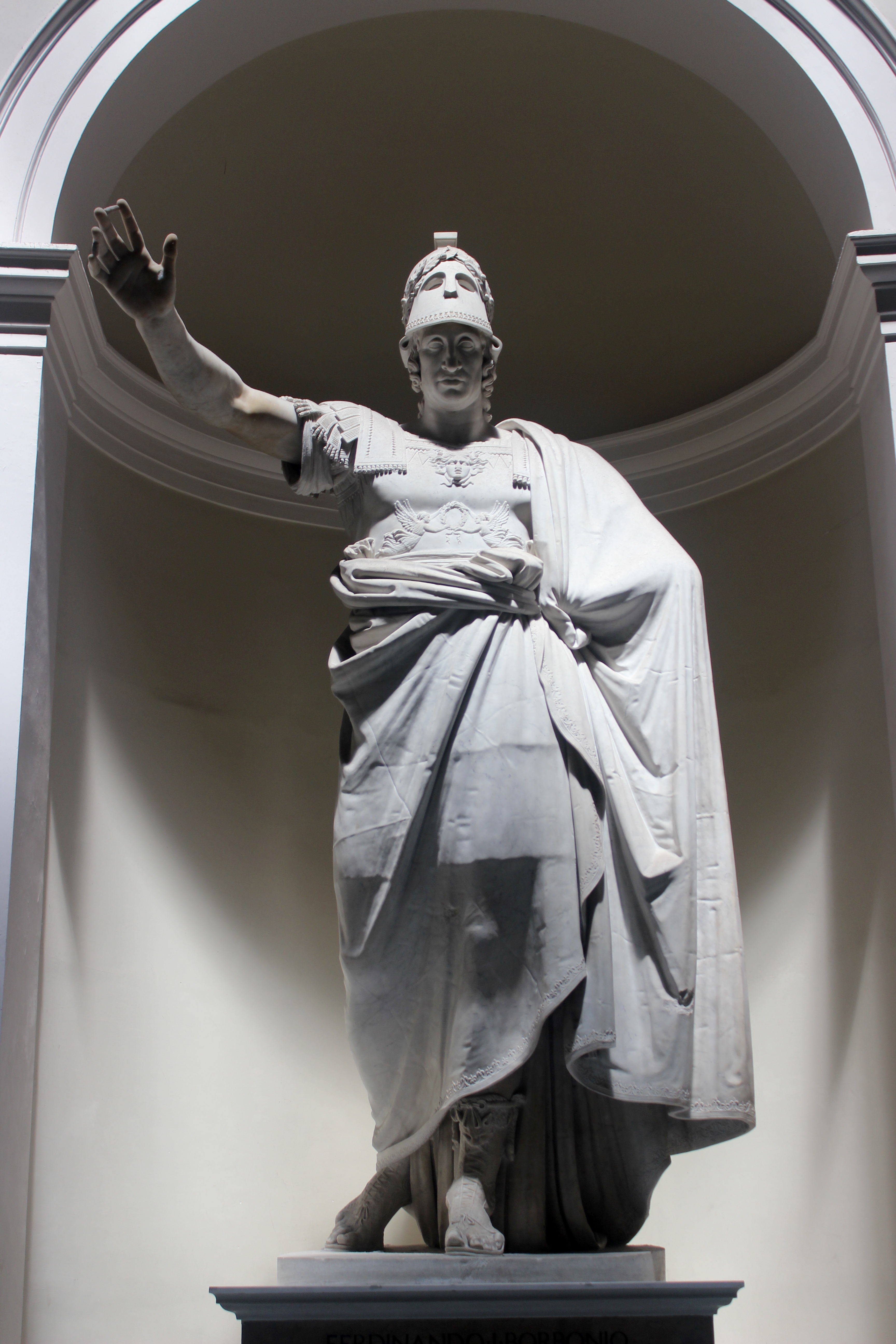 Antonio Canova. Fernando I de Borbón como Atenea. Nápoles, Museo Archeologico Nazionale.